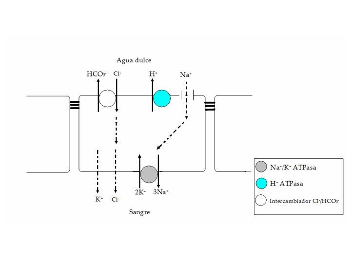 1.El intercambiador Cl-/HCO3- en la membrana apical intercambia por Cl- por HCO3-. 2. La H+ ATPasa de de la membrana apical bombea H+ hacia el exterior de la célula generando una carga negativa en el lado interno de la membrana apical. 3. El gradiente eléctrico promueve la difusión de Na+ hacia el interior de al célula a través de una canal Na+. 4. La bomba Na+ / K+ bombea el Na+ hacia la sangre.